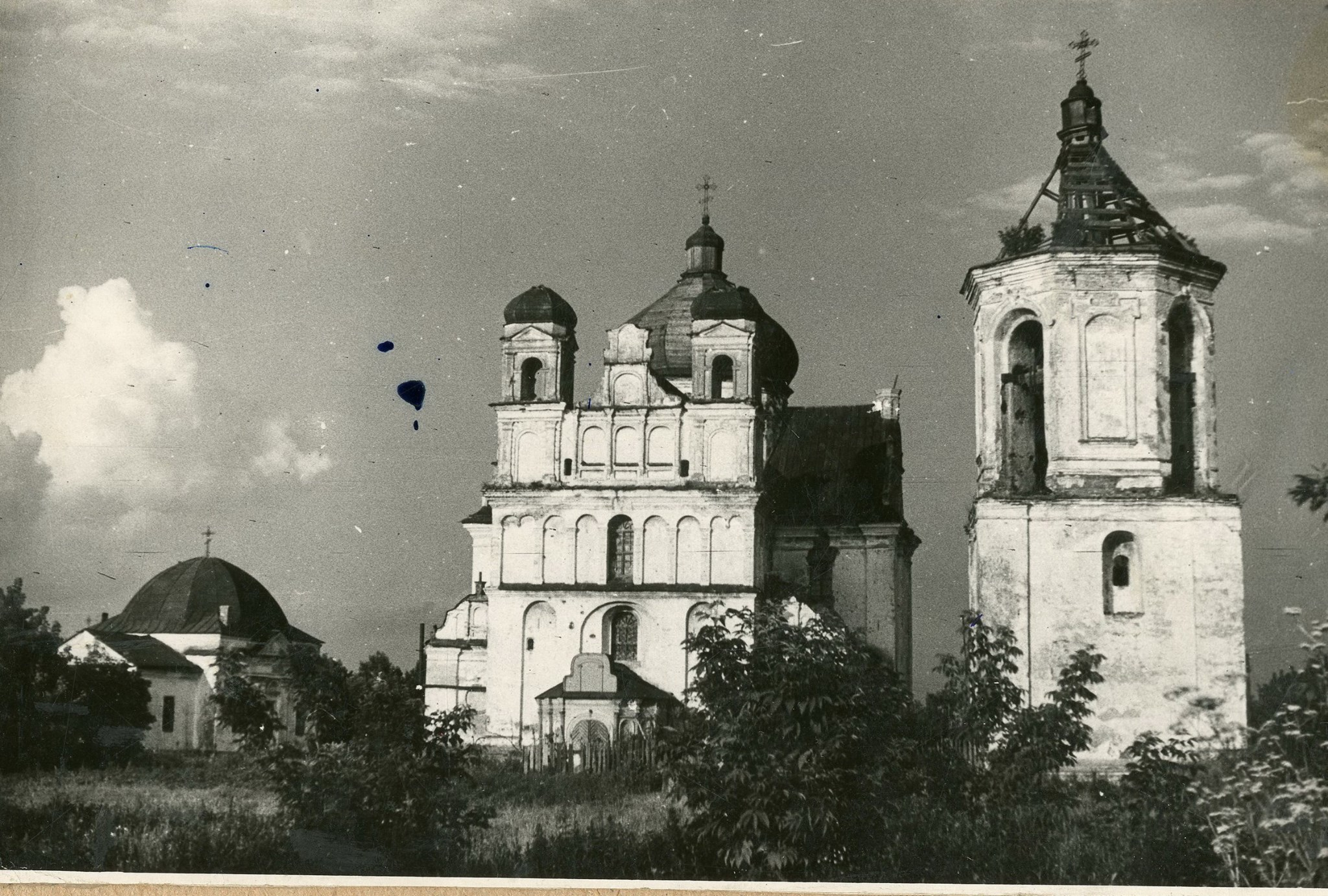 Беларуская (тарашкевіца): Магілёў (Mahiloŭ), Падмікольле (Padmikolle). Манастыр Сьвятога Мікалая